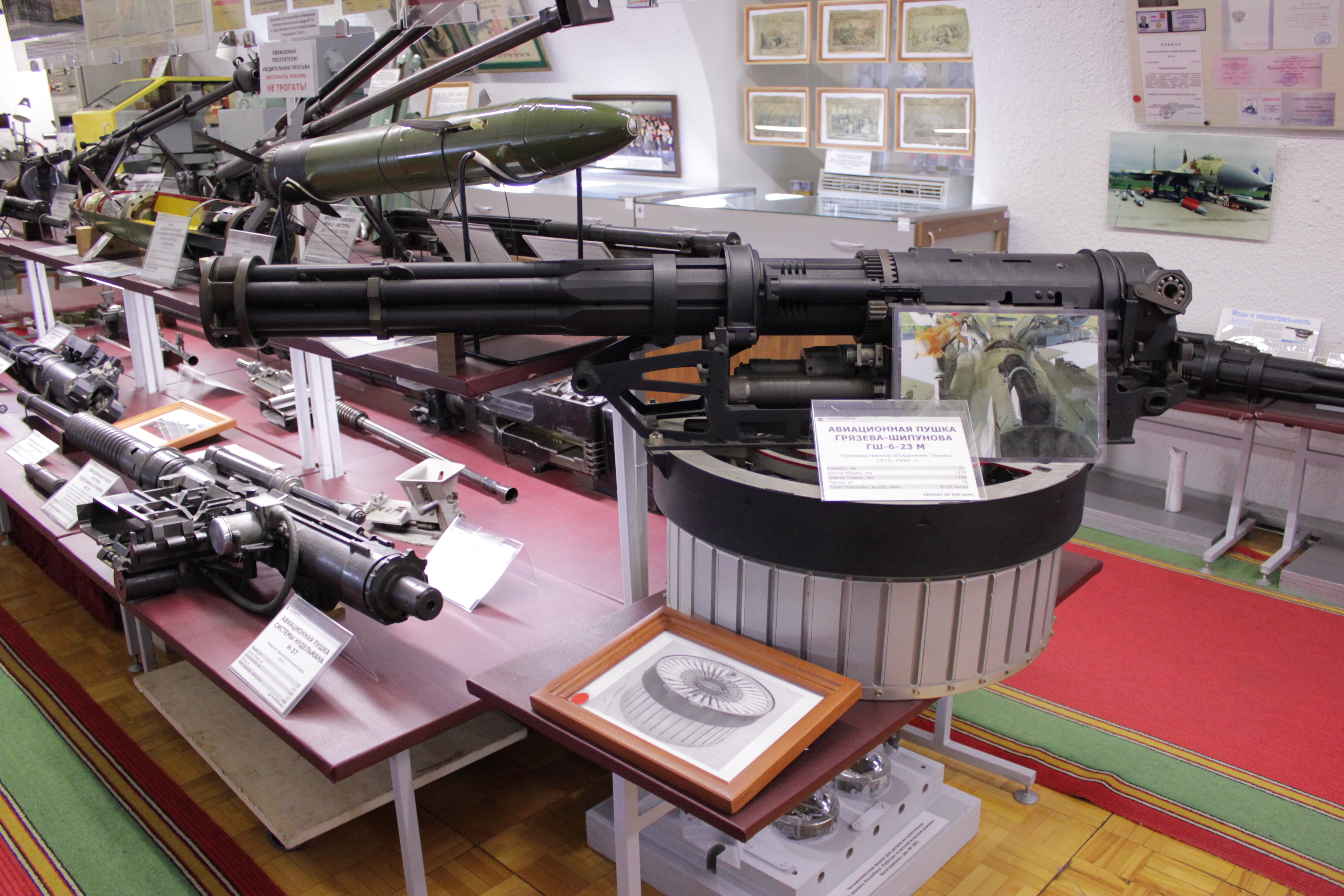 Экспозиция музея Ижмаш в Ижевске - авиационная пушка Грязева-Шипунова